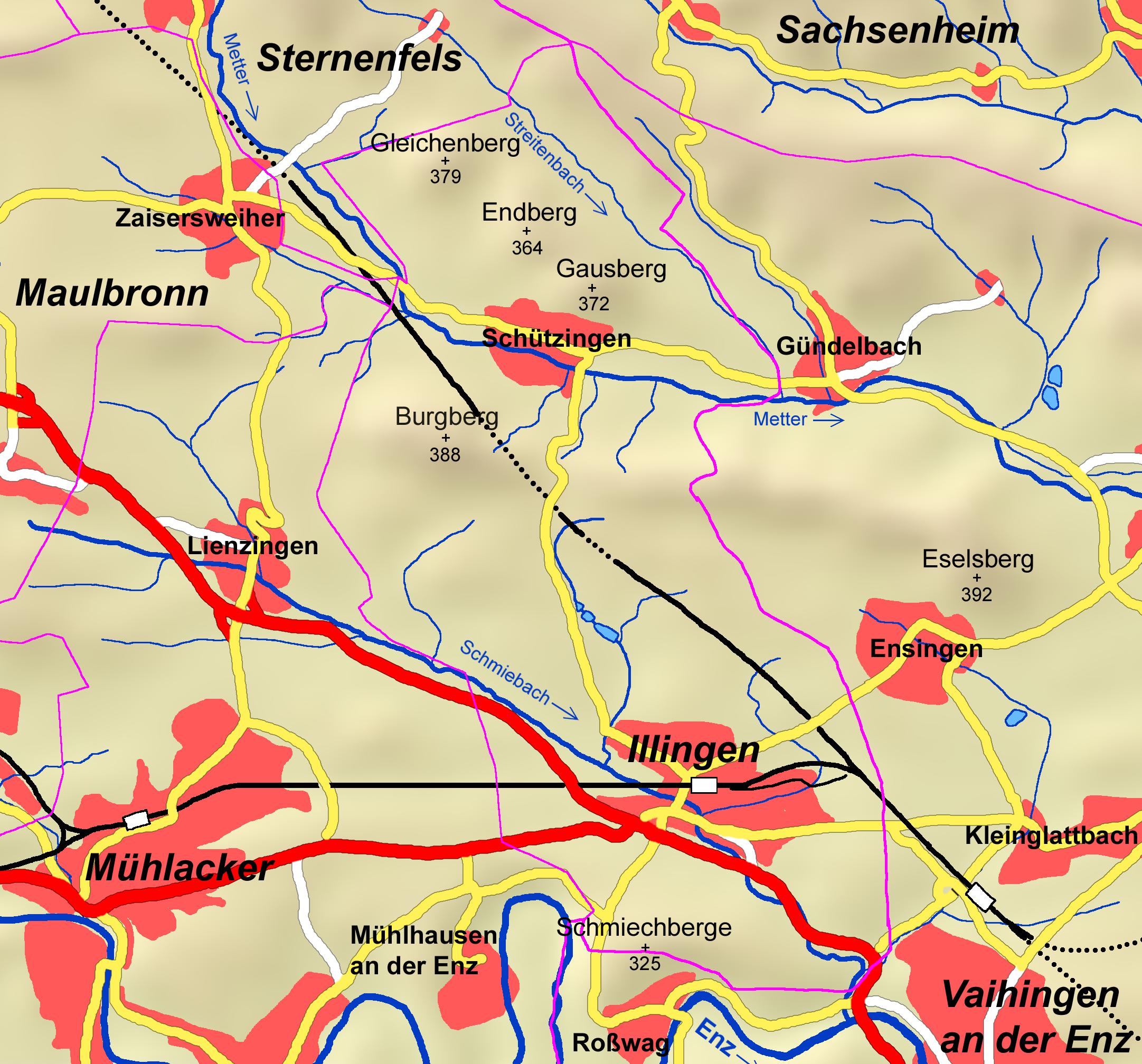 Karte des Gemeindegebiets von Illingen/Württemberg